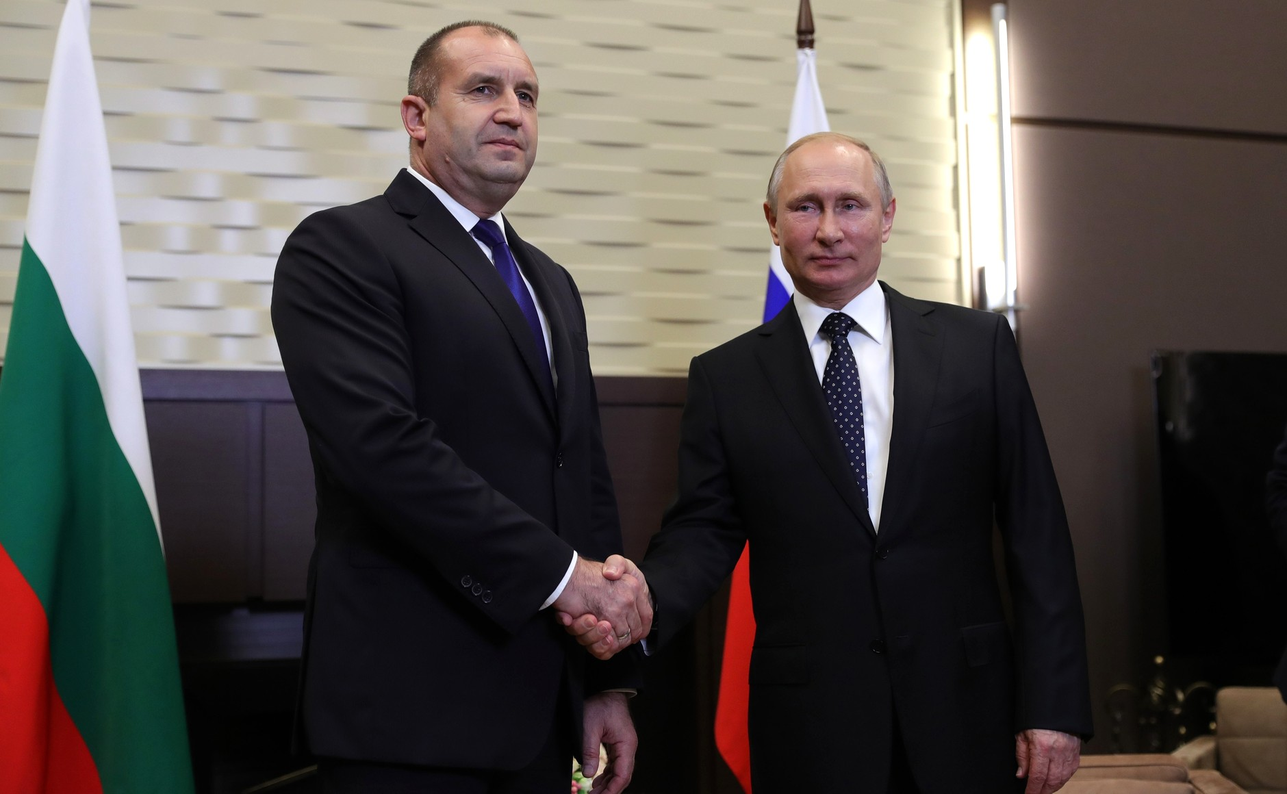 Встреча Президента России Владимира Путина с Президентом Болгарии Руменом Радевым